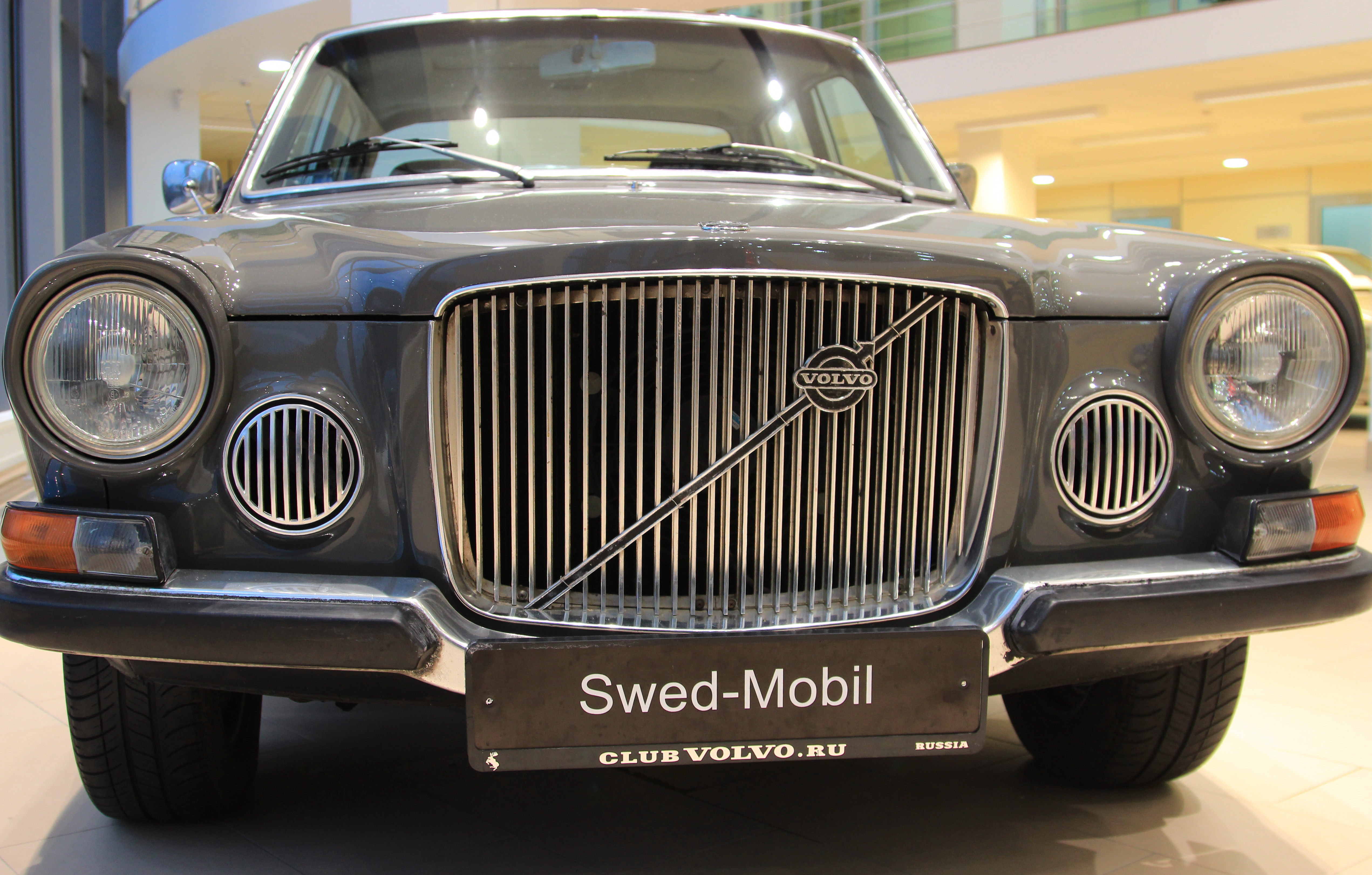 Volvo 164_Вид спереди_решетка радиатора_Свид-Мобиль